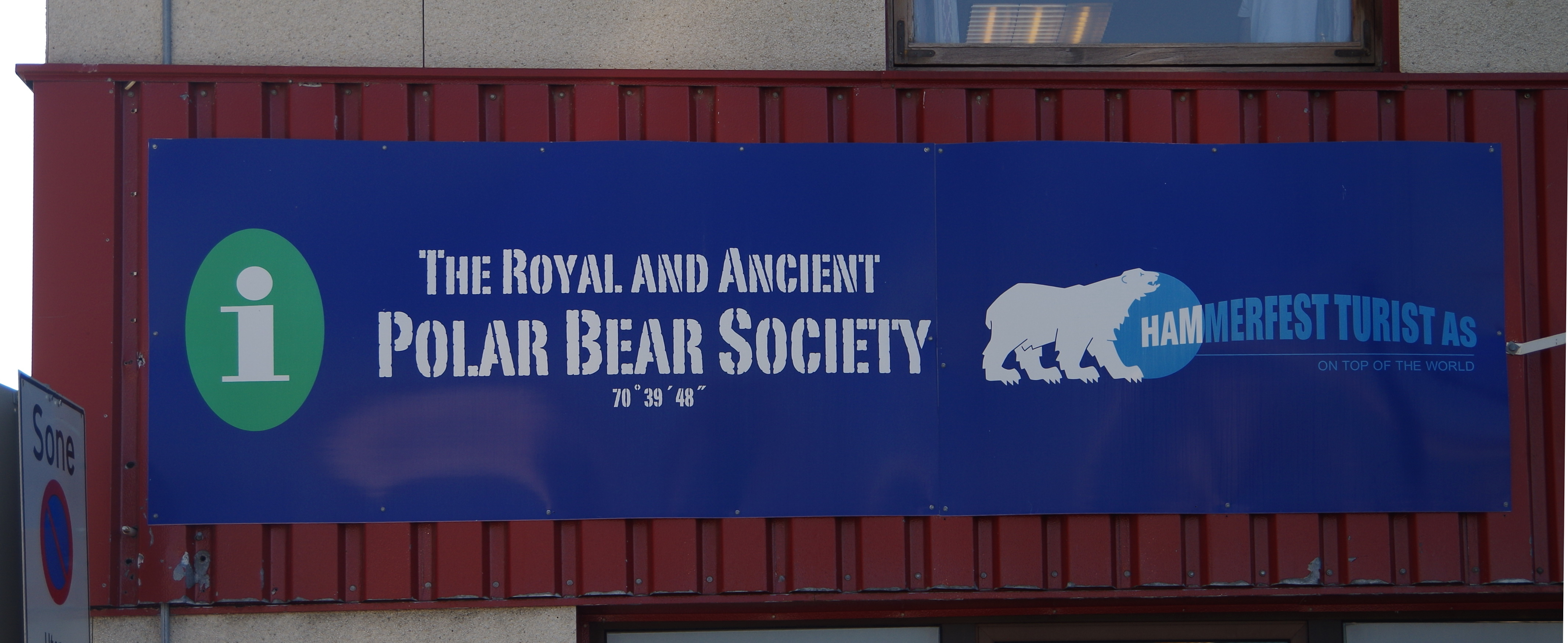 Hammerfest Eisbären-Club Eingang